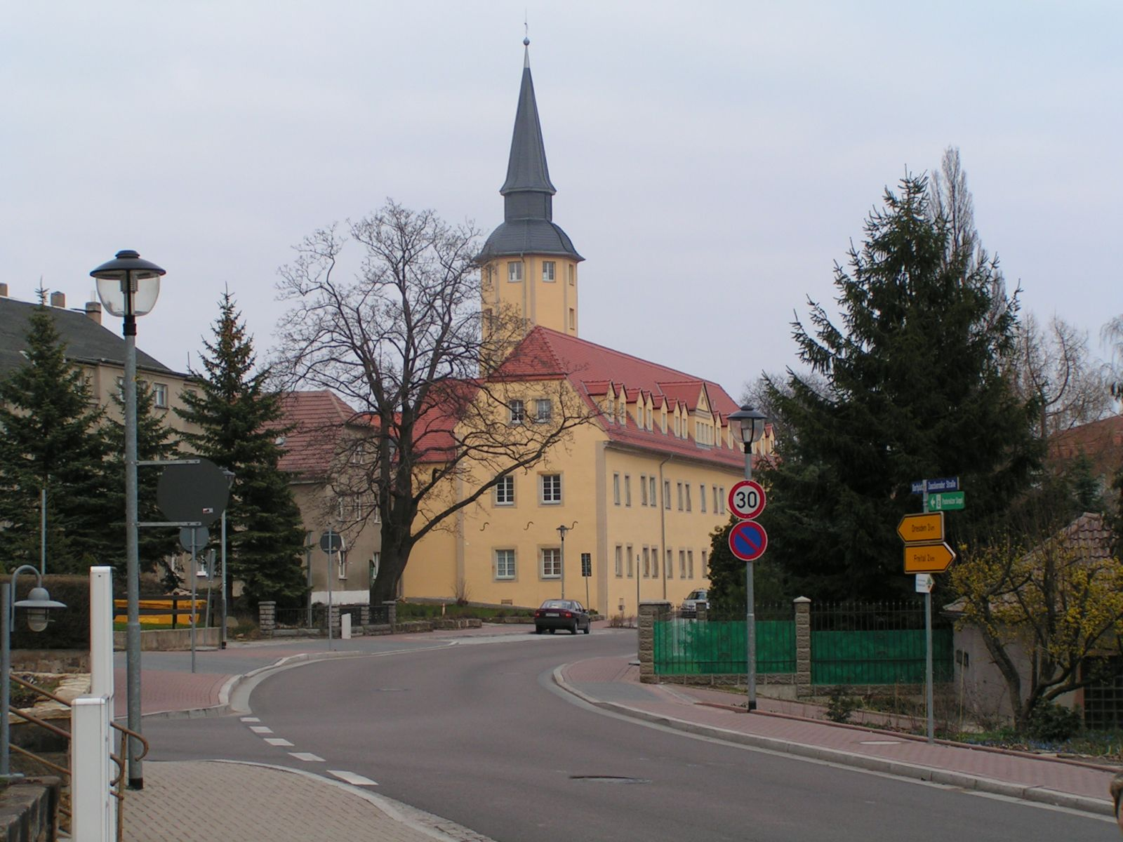 Pesterwitz